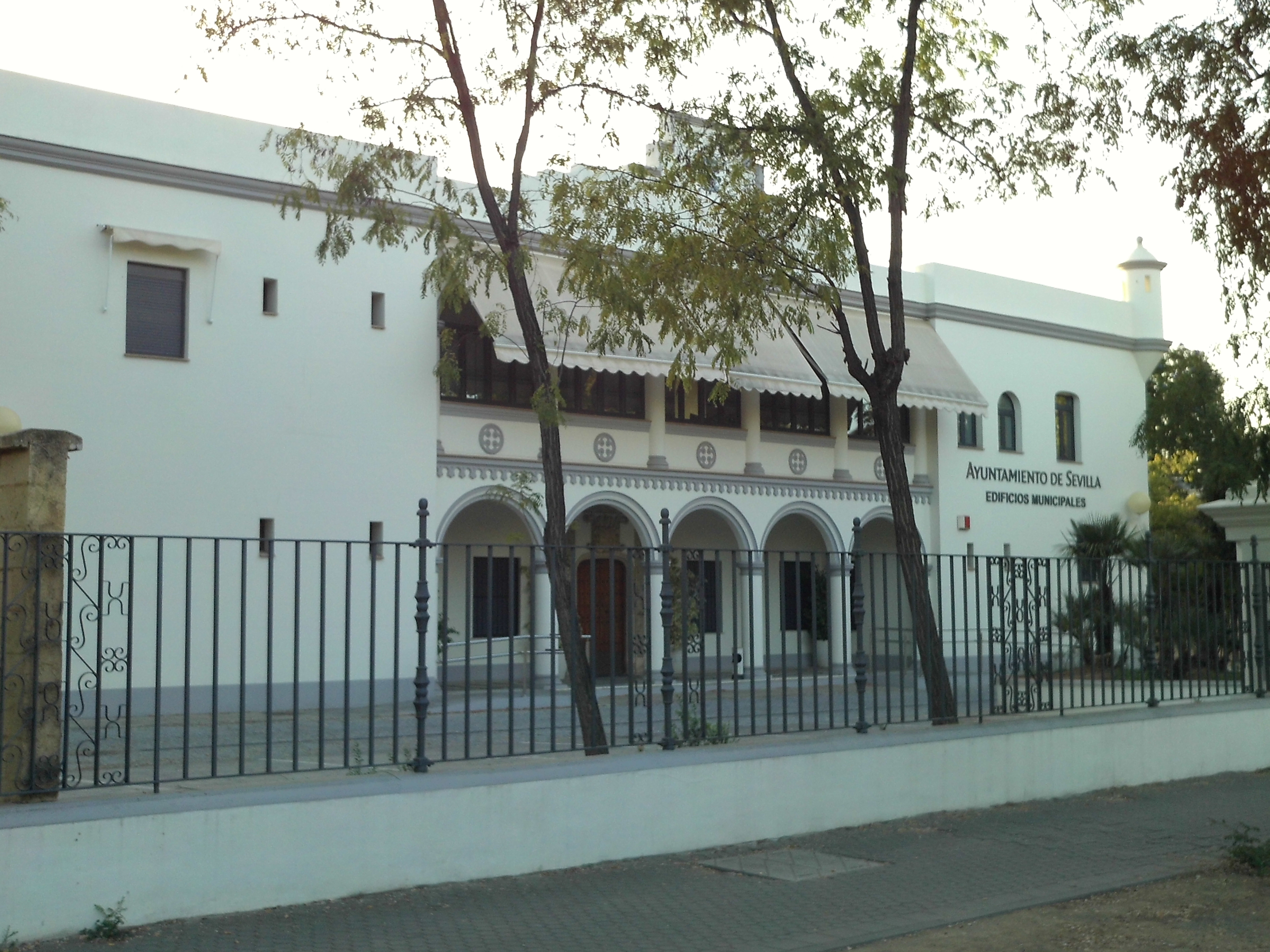 Pabellón de Santo Domingo (o República Dominicana). Sevilla, Andalucía, España.